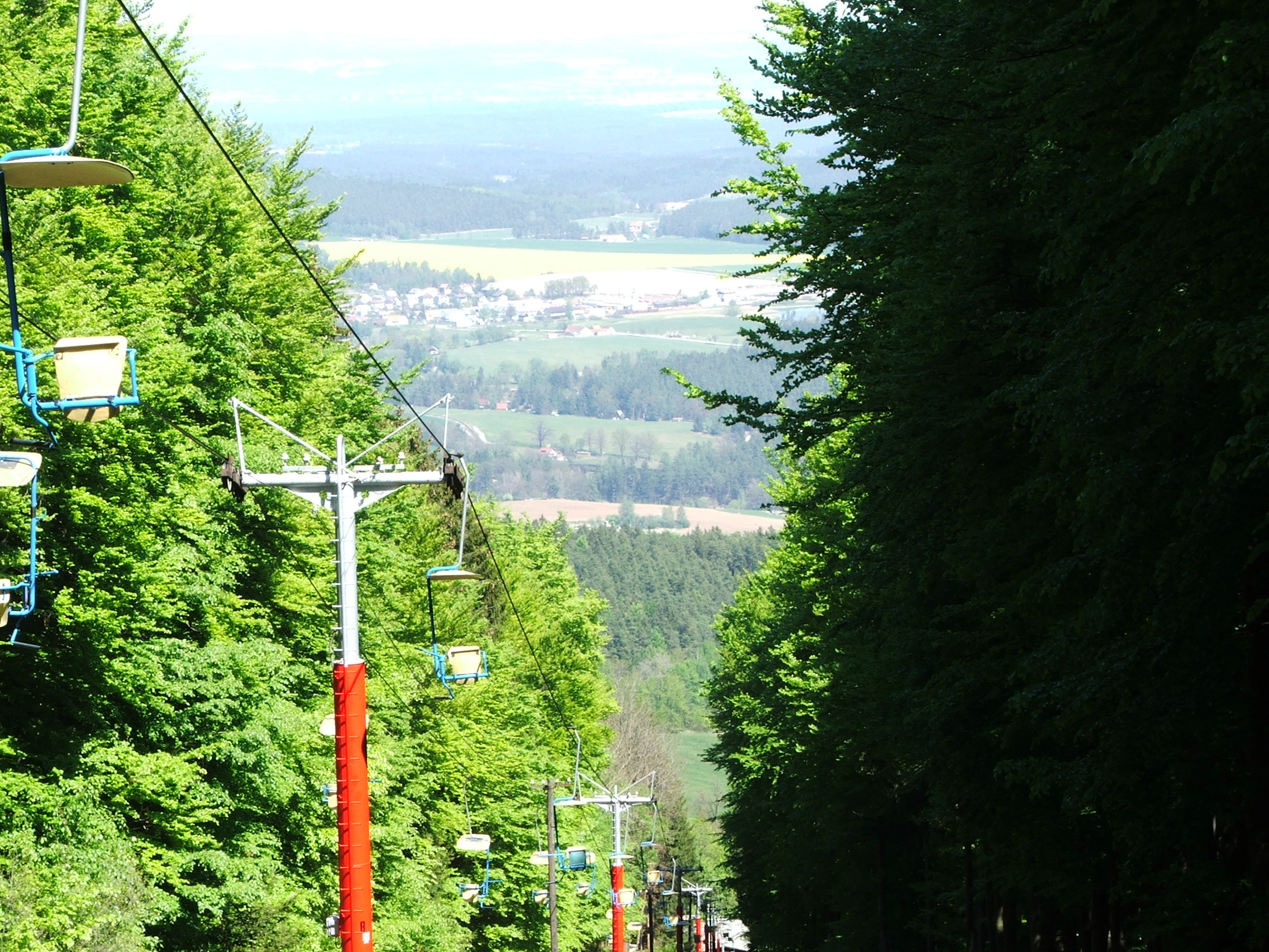 Lanovka na Kleť